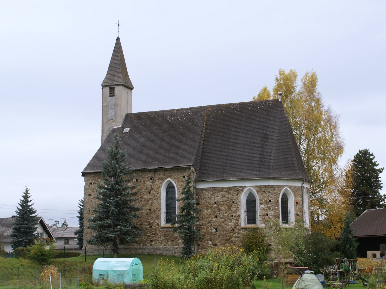 Kath. Filialkirche hl. Andreas, Schimmelkirche. Südansicht